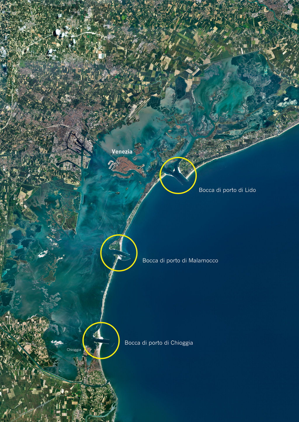 Immagine da satellite della laguna di Venezia e localizzazione delle tre bocche di porto di Lido, Malamocco e Chioggia dove è in corso la realizzazione del MOSE.